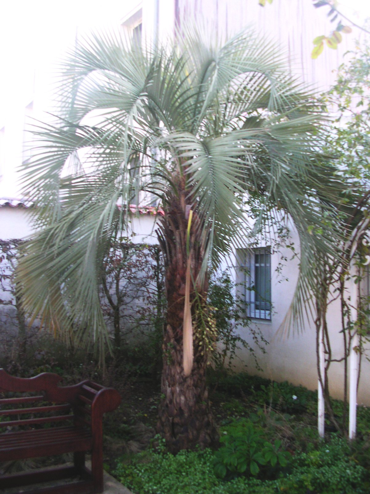 Butia capitata du jardin botanique de La Rochelle (Charente-Maritime, France).